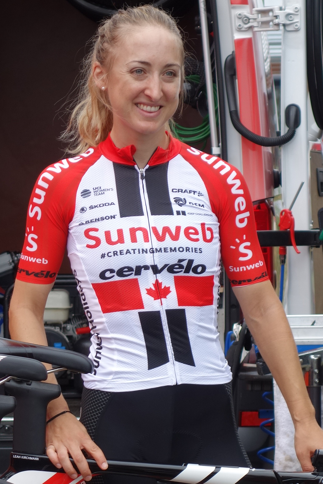 Leah Kirchmann (Sunweb) bij de proloog op het Tom Dumoulin Bike Park in Sittard in de Boels Ladies Tour 2019